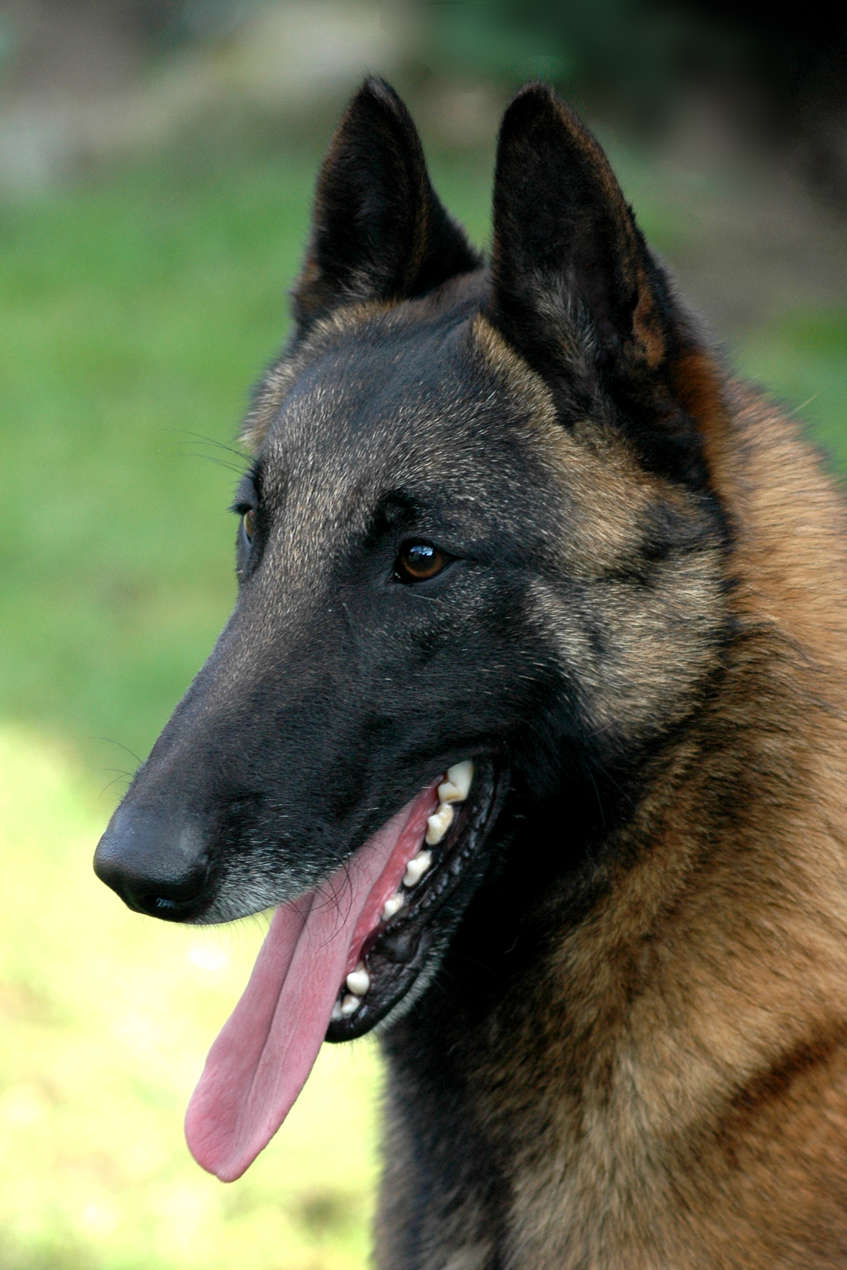 Belgian Malinois